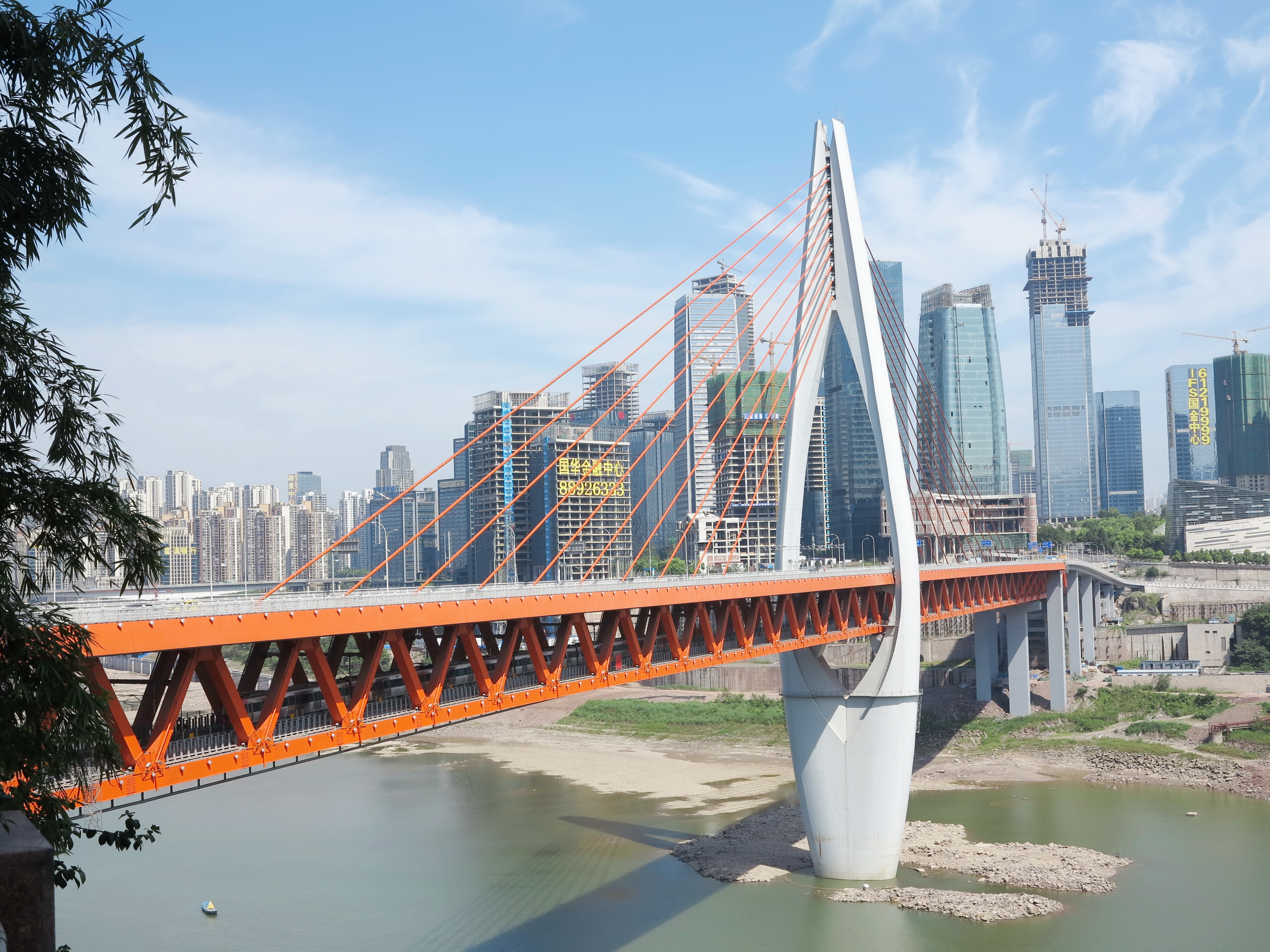 重庆 江北